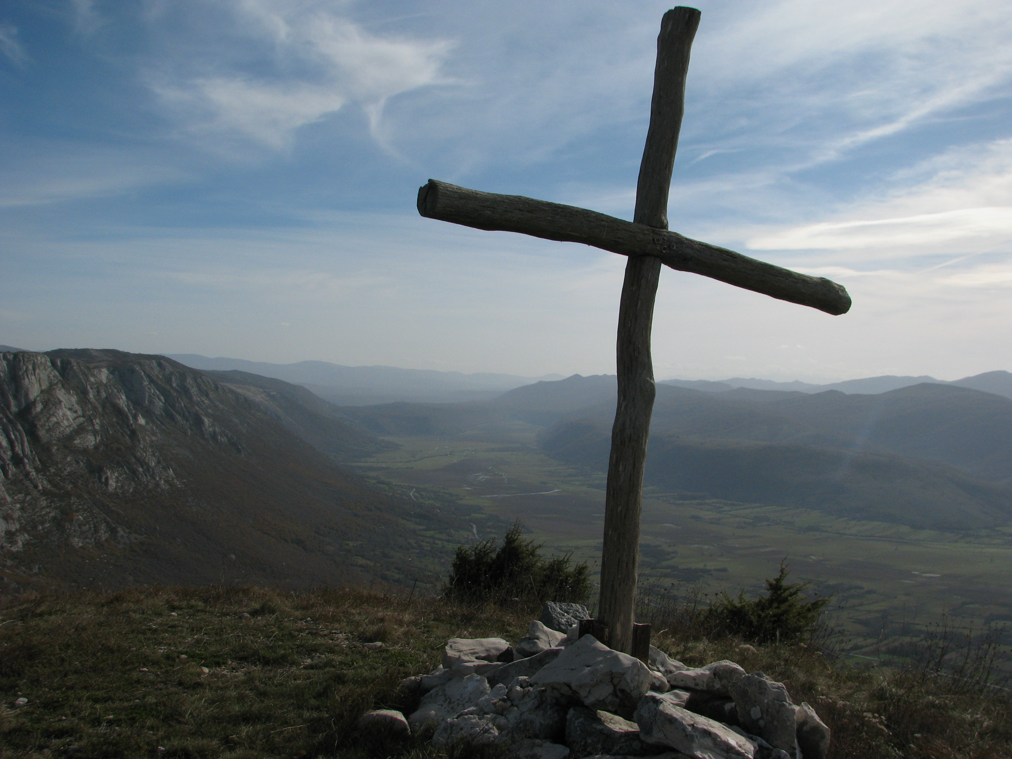 Praistorijska gradina Straževica, Dragaljevo. Drveni krst postavljen na brdu Straževica iznad Dabarskog polja, na mjestu ostatka nekadašnje praistorijske gradine. Сликава е подигната во рамките на проектот „По трагата на душата 2015“.